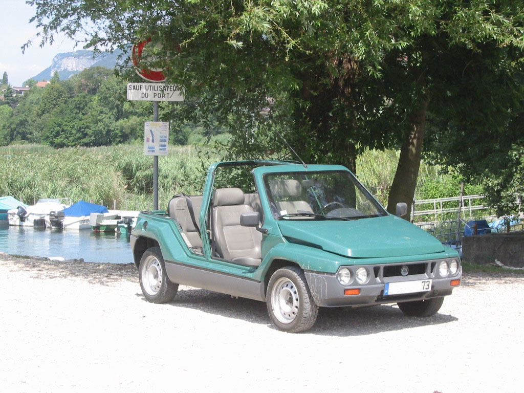 Mega Ranch 1.5D, sous sa forme la plus simple (ni toit, ni portes, ni coffre). Savoie, France